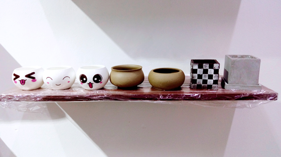 gốm sứ đất sét nhật bản